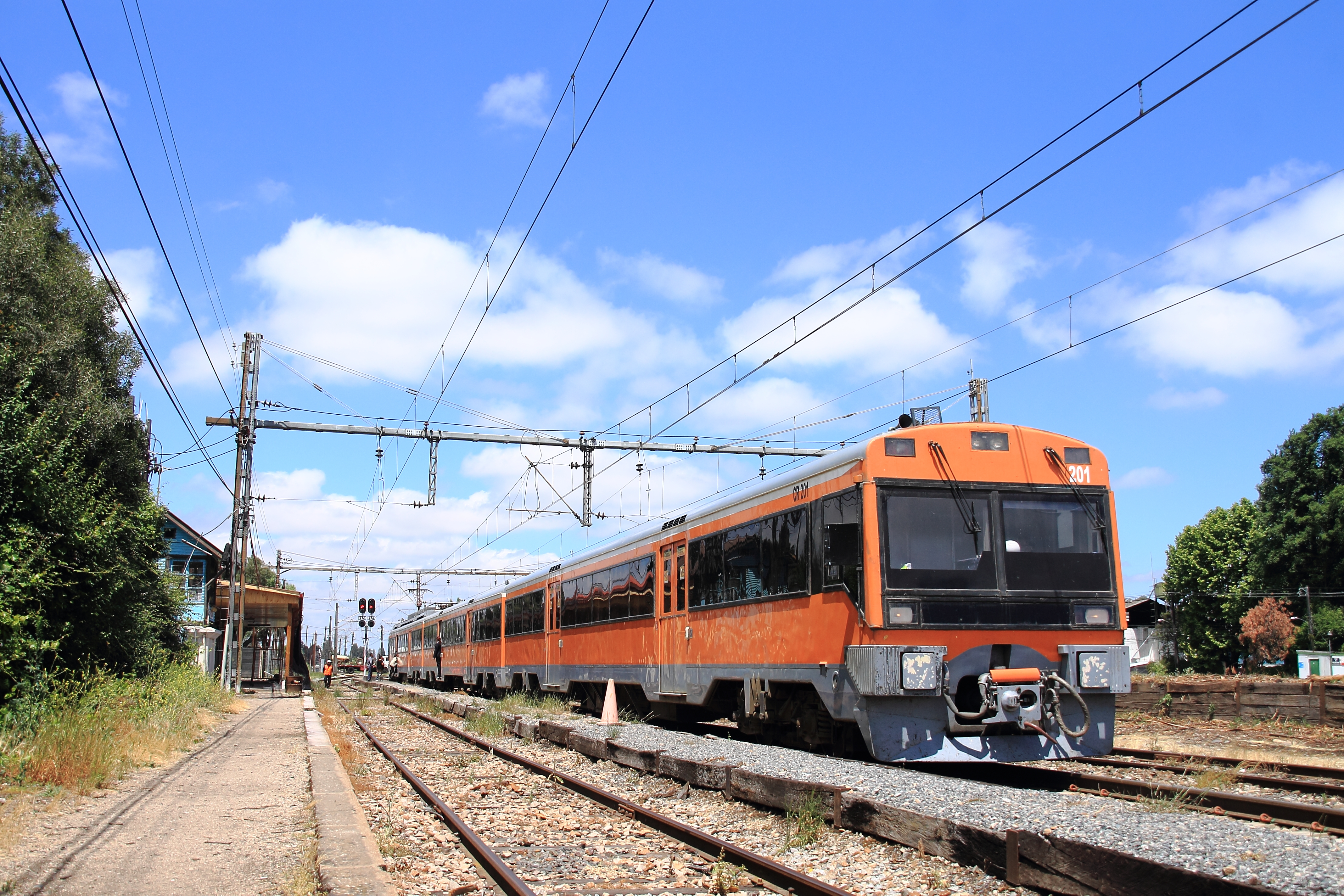 Hasta hace poco una de las tantas estaciones abandonadas de nuestra red sur, que solo vean el ir y venir de los pocos servicios que van quedando, hoy es una mas de las detenciones del Expreso Maule y Terrasur Chillan, que poco a poco van sumando mas pasajeros en este pequeño poblado al sur de Curico. Por estos días ademas se trabaja a full en la renovación total del edificio para dejarlo operativo y así poder recibir a sus pasajeros como se debe. UT440-201 en linea principal tomando pasajeros con el servicio Expreso Maule Linares-Alameda Noviembre 2014